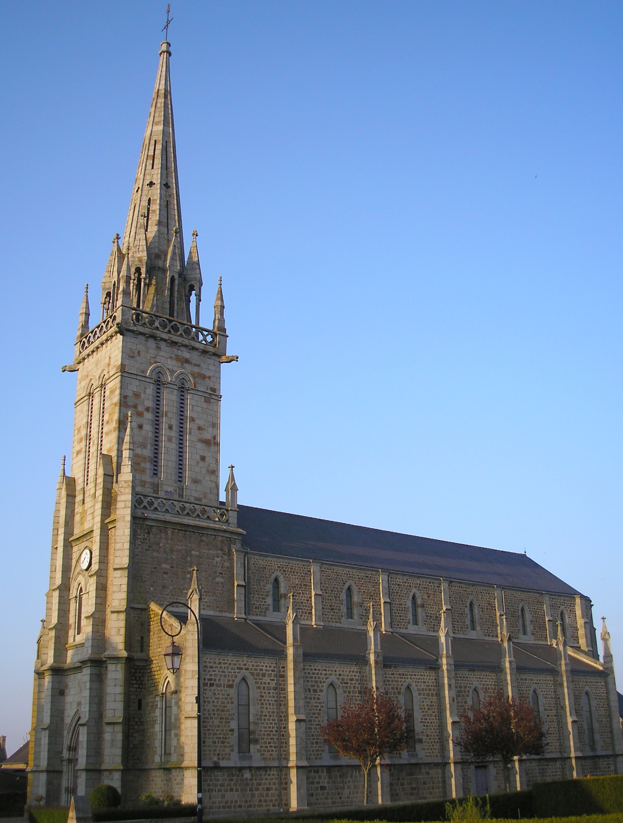 Buais (Normandie, France). L'église Sainte-Anne.